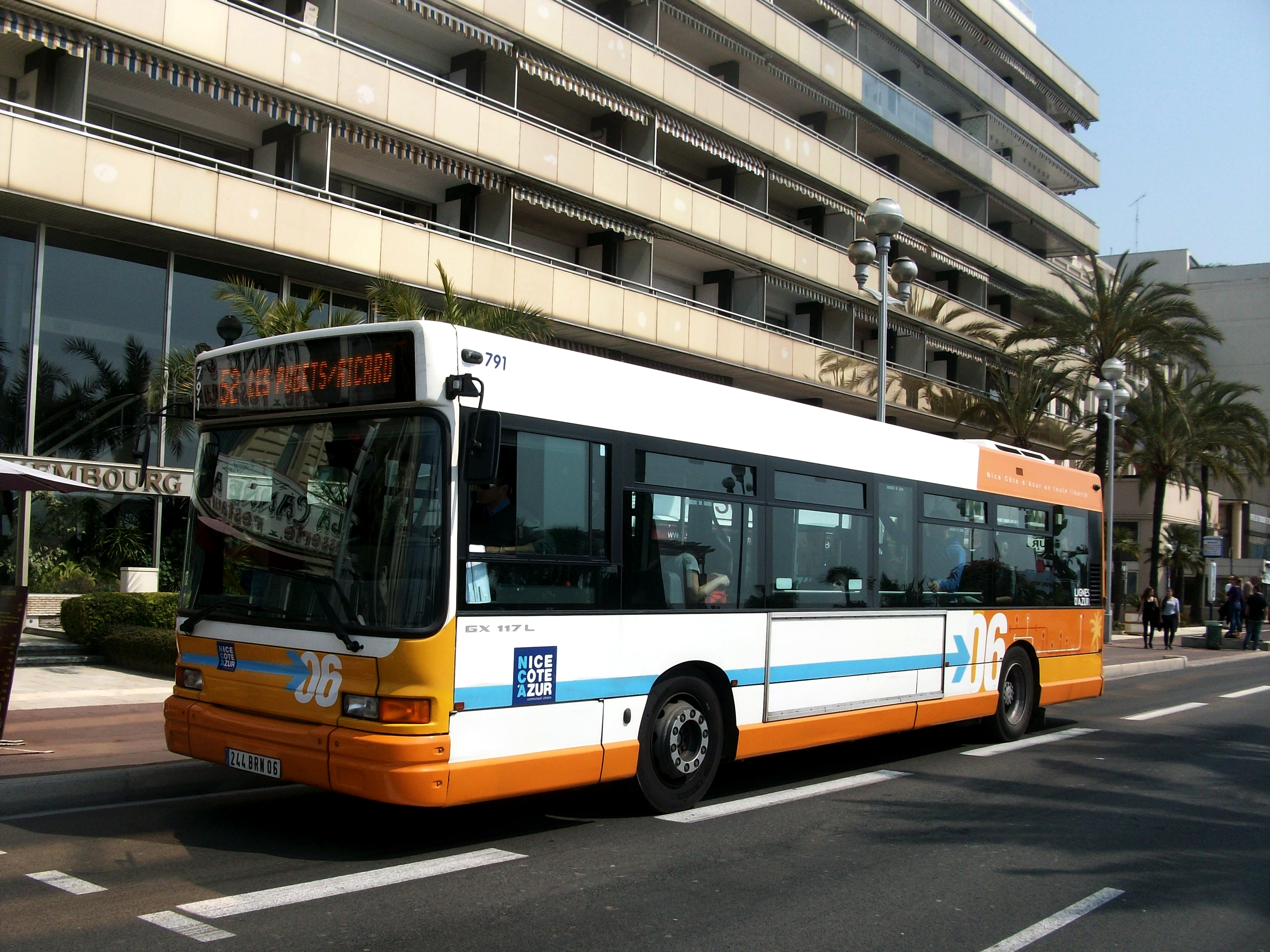 Heuliez GX 117 L sur la ligne 52 du réseau de Nice.